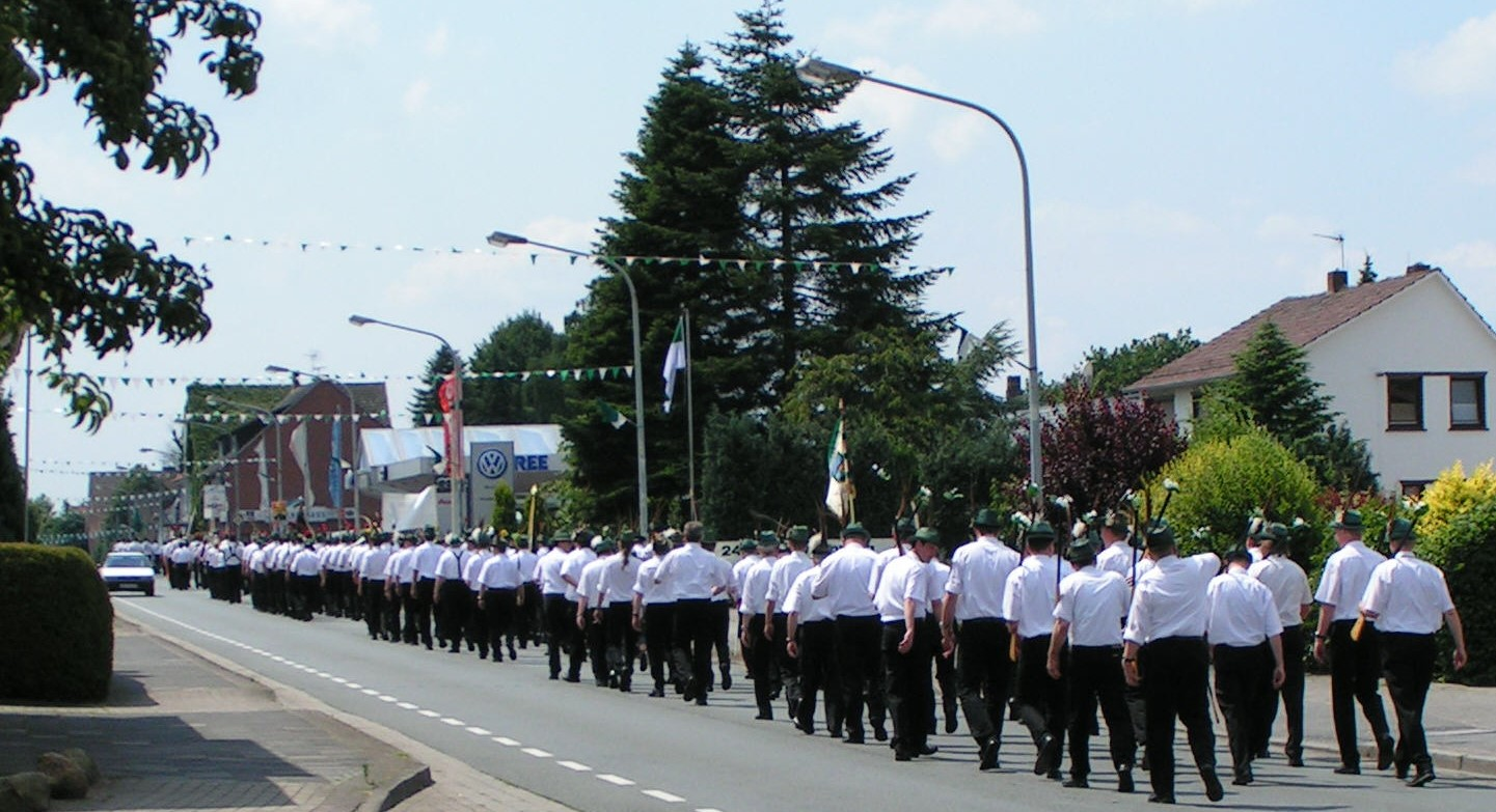 Schützenfestmontag 2005: Ausmarsch der Schützen auf der Lindenstraße